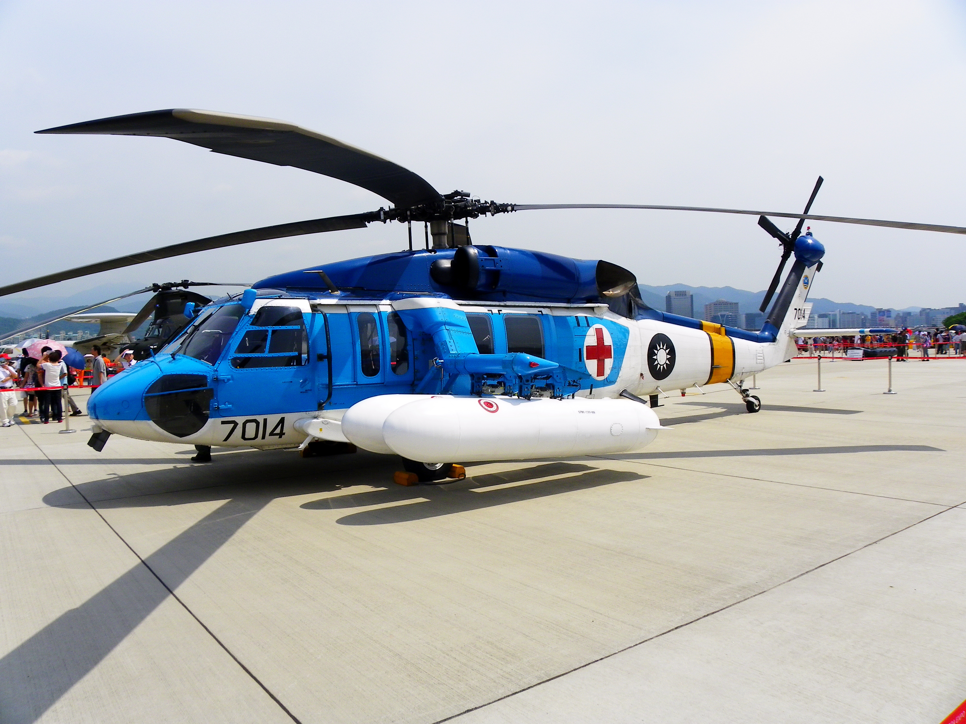 中華民國空軍救護隊S-70C 7014直昇機之左側面，攝於2011年8月13日松山基地開放活動。